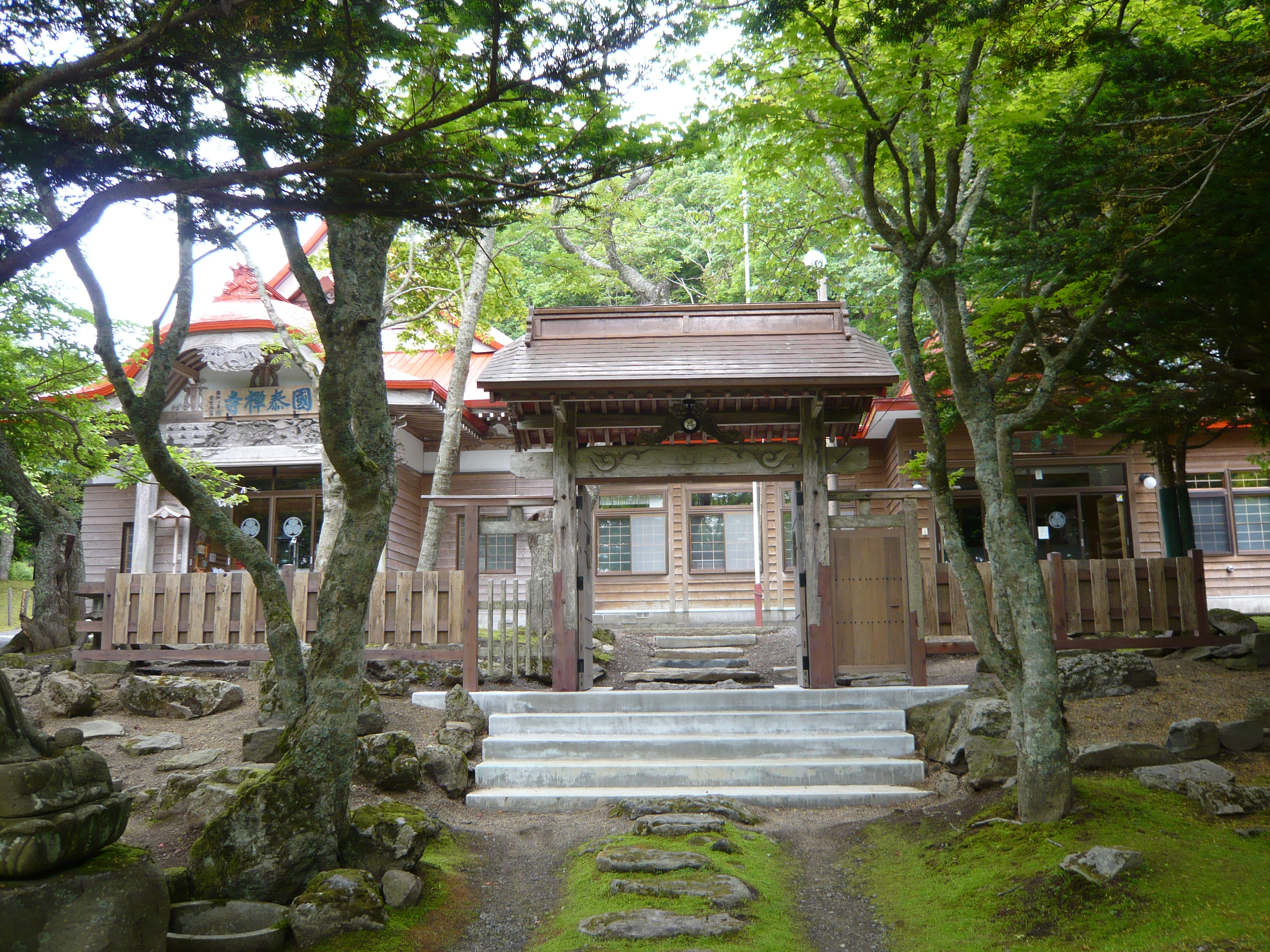 厚岸町の国泰寺。左が本堂